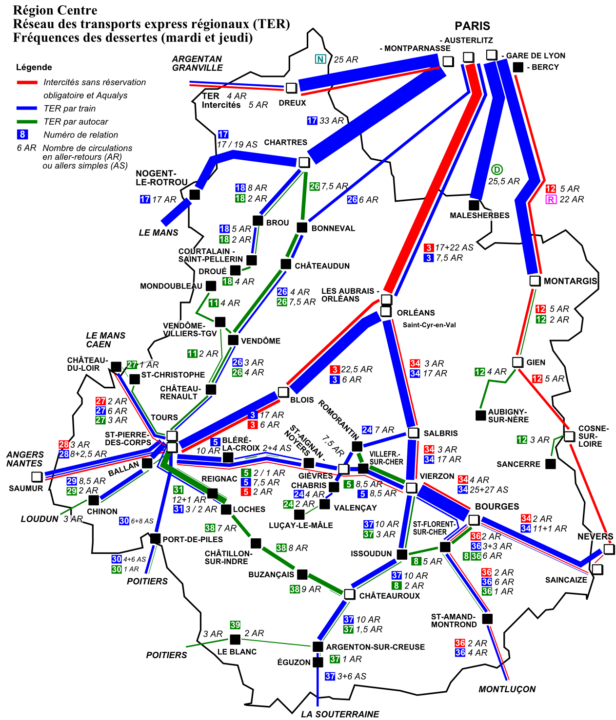 TER Centre : fréquences des dessertes les jours types de pleine semaine (mardi et jeudi), horaire annuel 2012.